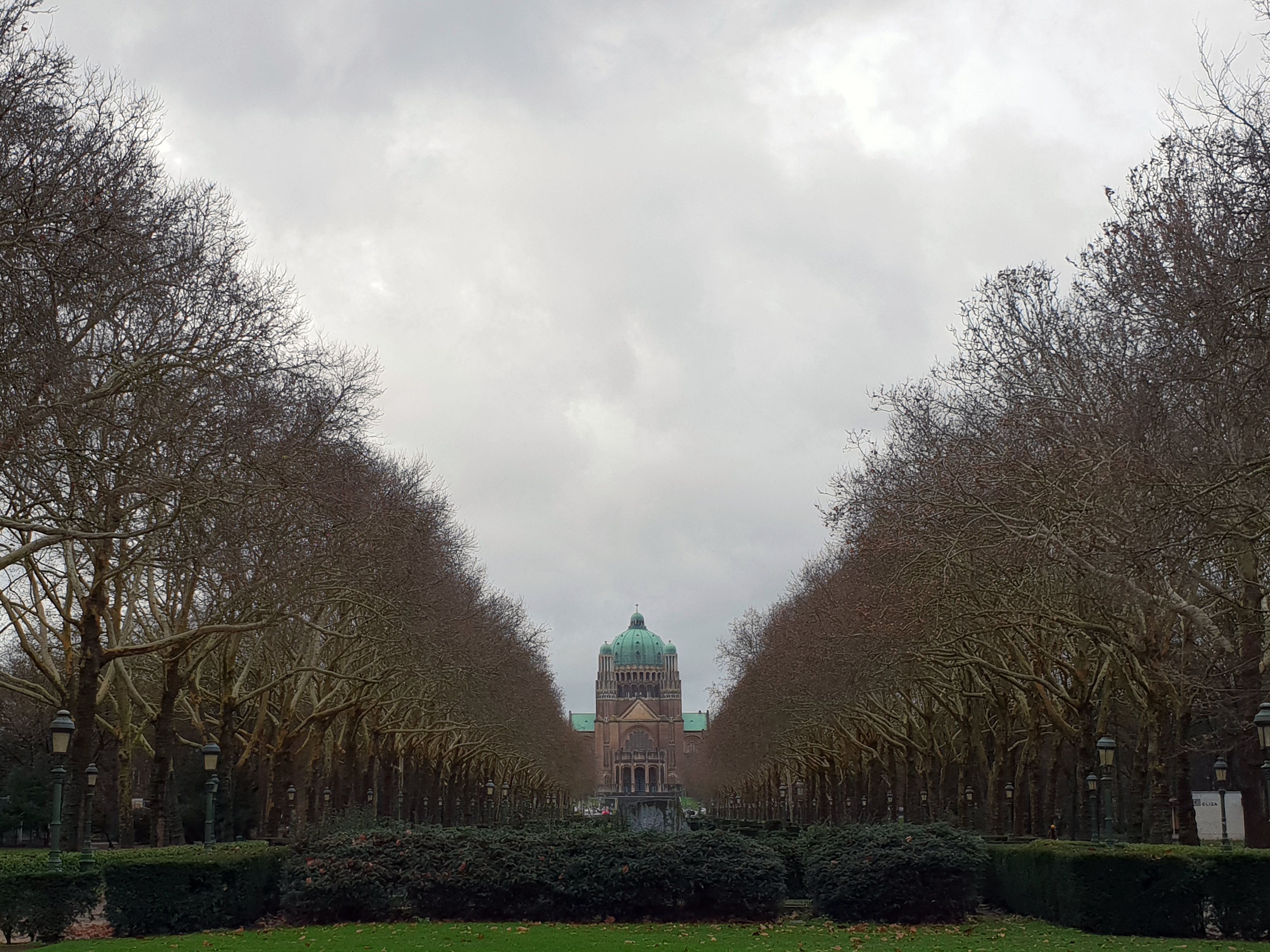 Parc Elisabeth